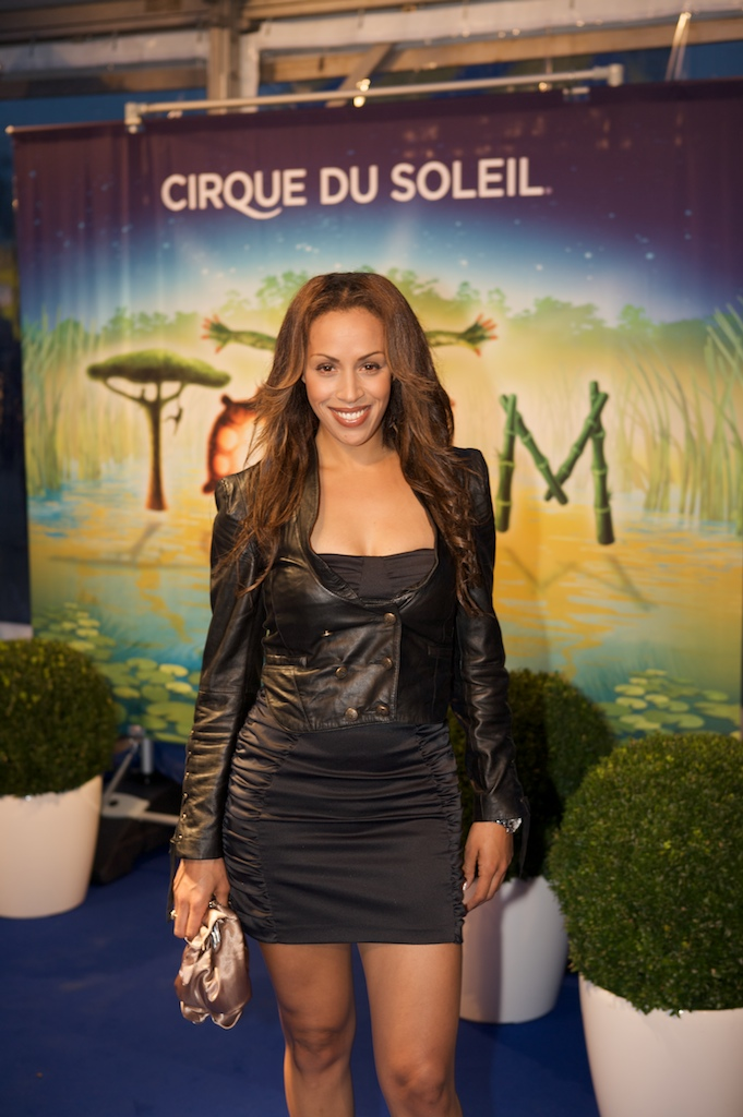 Glennis Grace bij de Europese première Cirque du Soleil in Amsterdam